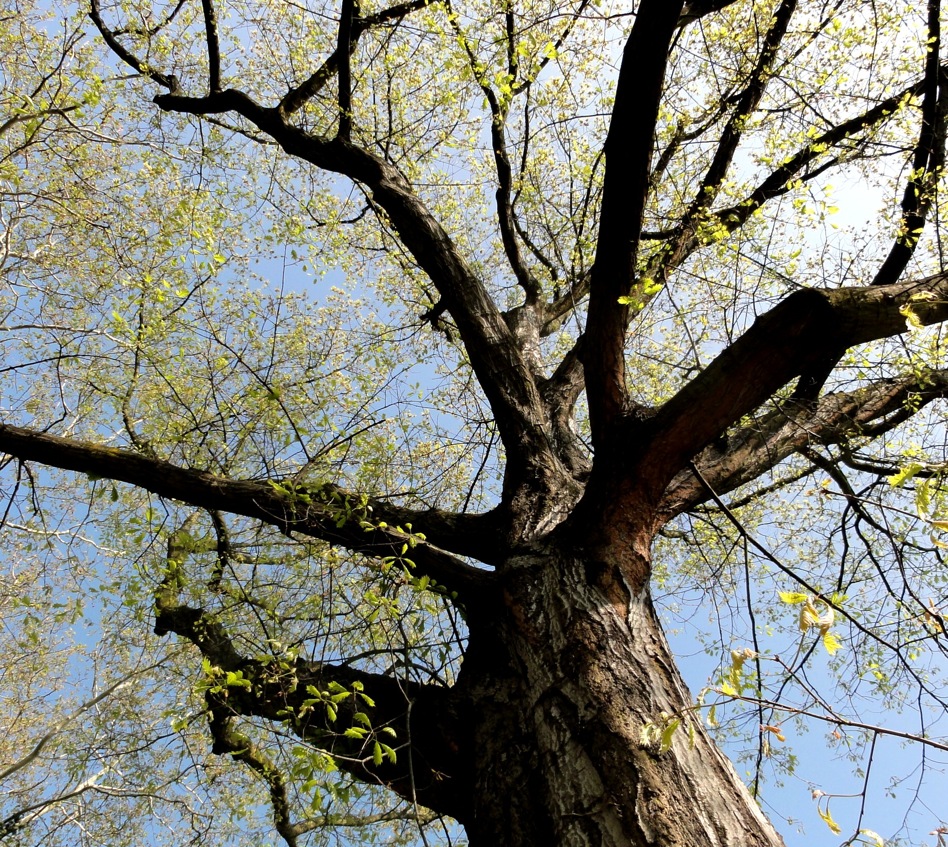 Quercus rubra